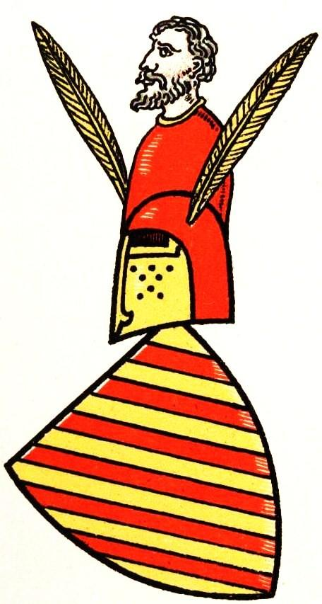 Wappen der Grafen von Dortmund